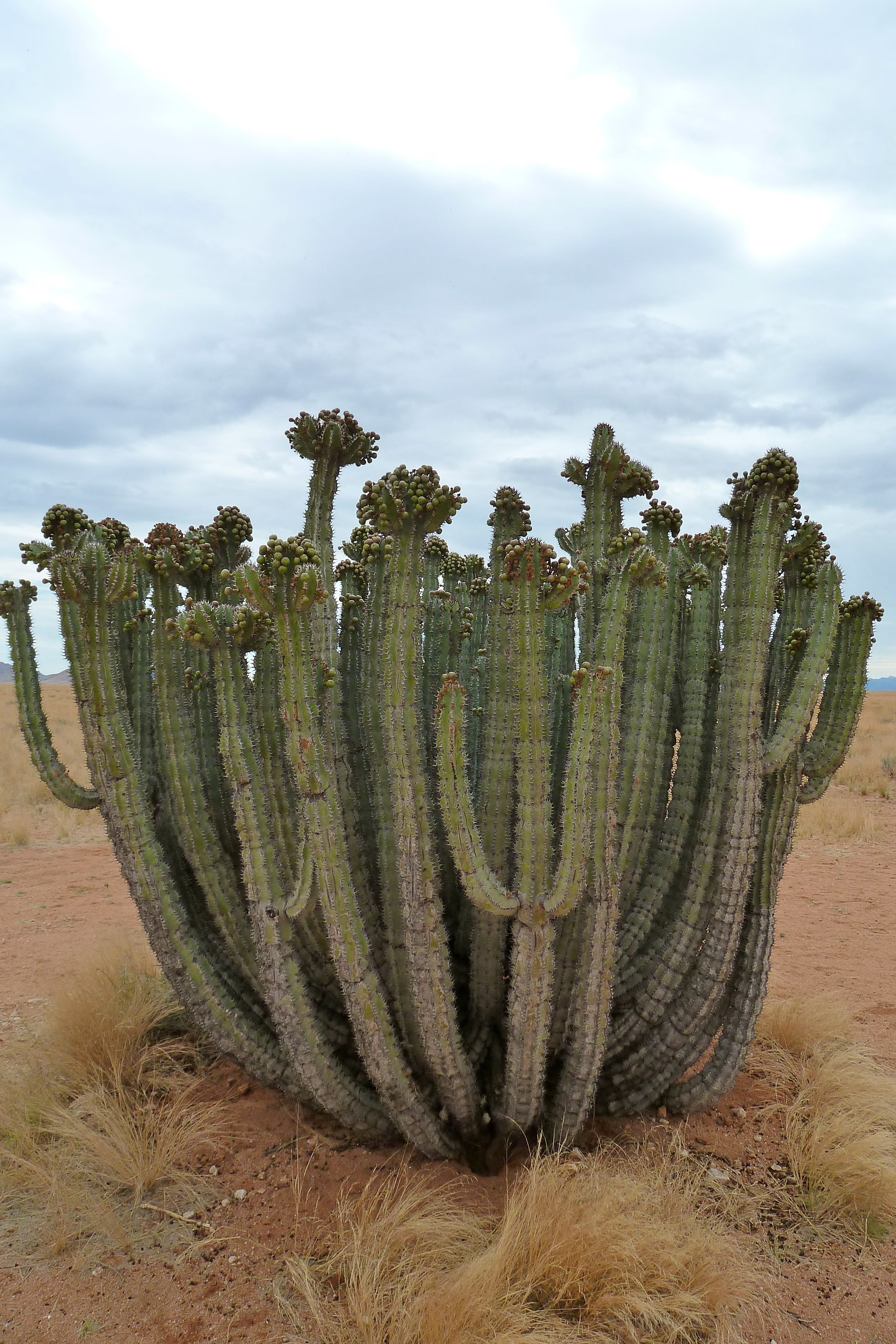 Ausgewachsene Euphorbia virosa nahe Solitaire am Rand des Namib-Naukluft Parks